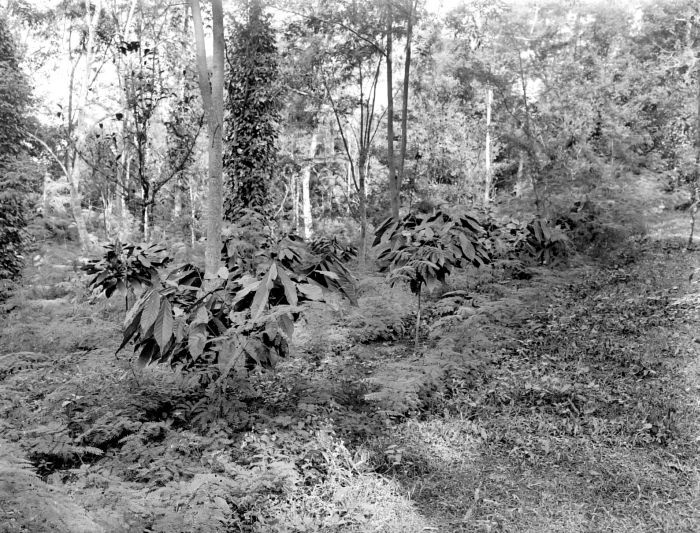 Negatief. Jonge, een-jarige cacaoplanten met lamtoro als grondbedekker op onderneming Assinan, Midden-Java